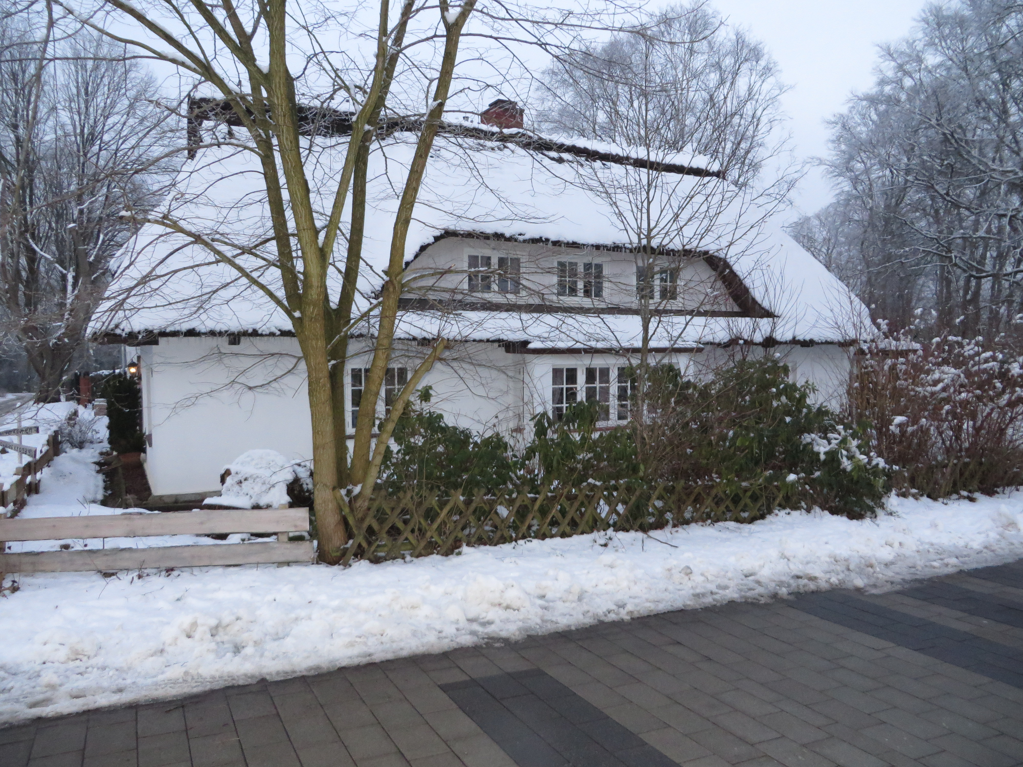 Solitüder Straße 83 (Flensburg-Mürwik, Waldeshöh 31. Januar 2015), Bild 03